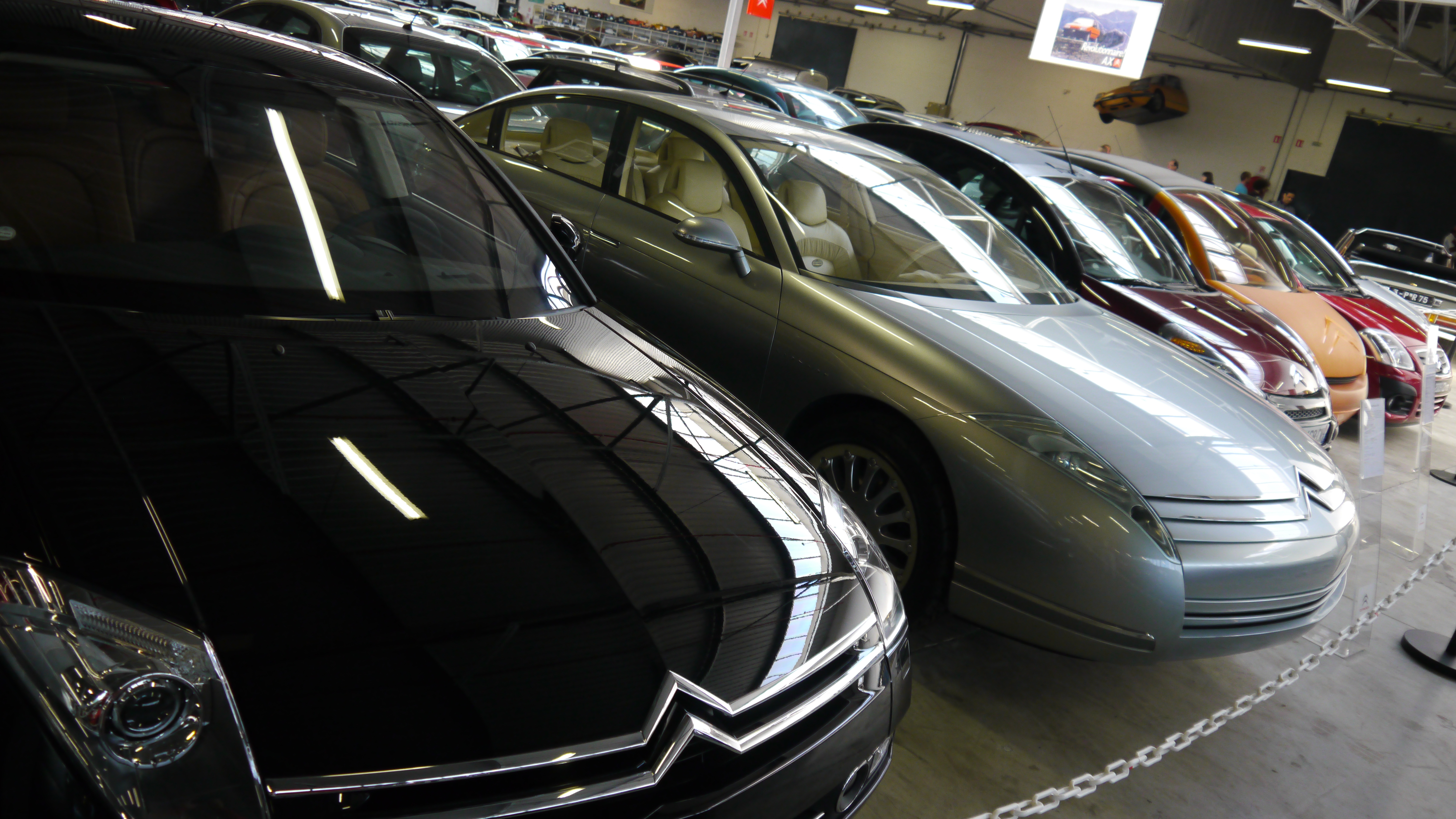 Conservatoire Citroen 233 Citroen C6